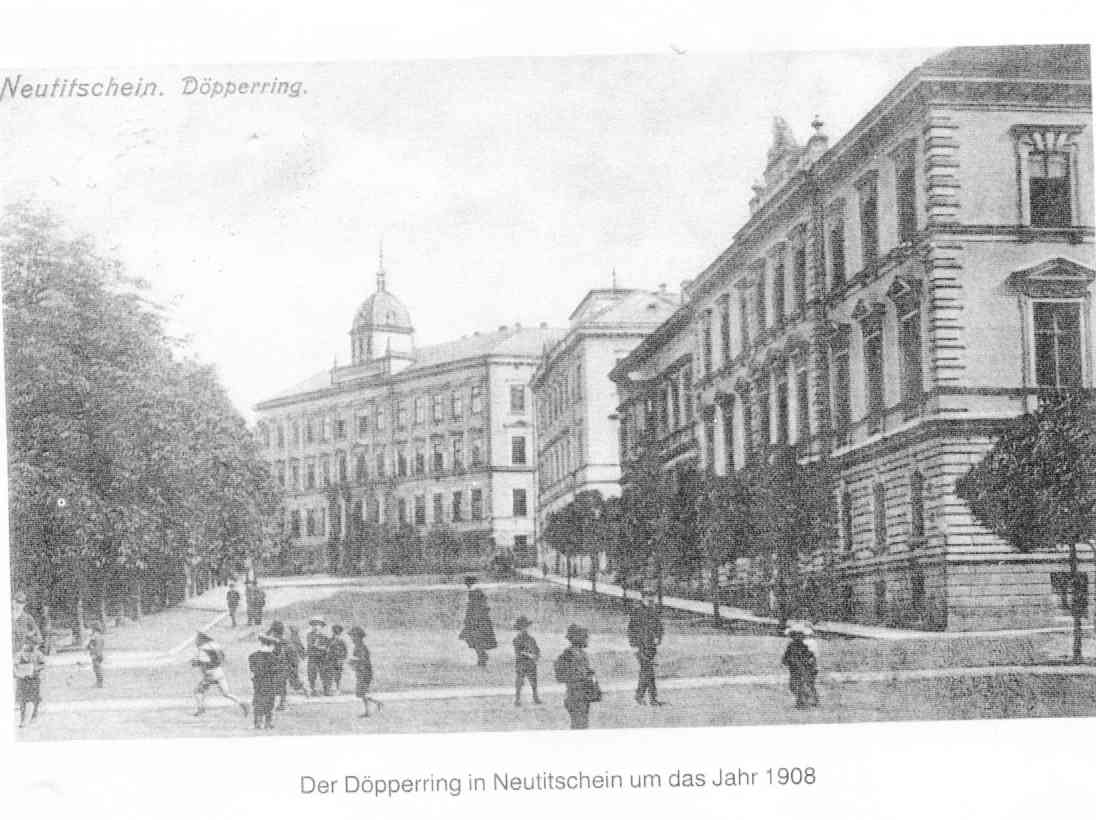 Döpperring in der Stadt Neutitschein (Mähren), heute Nový Jicin (Tschechien)